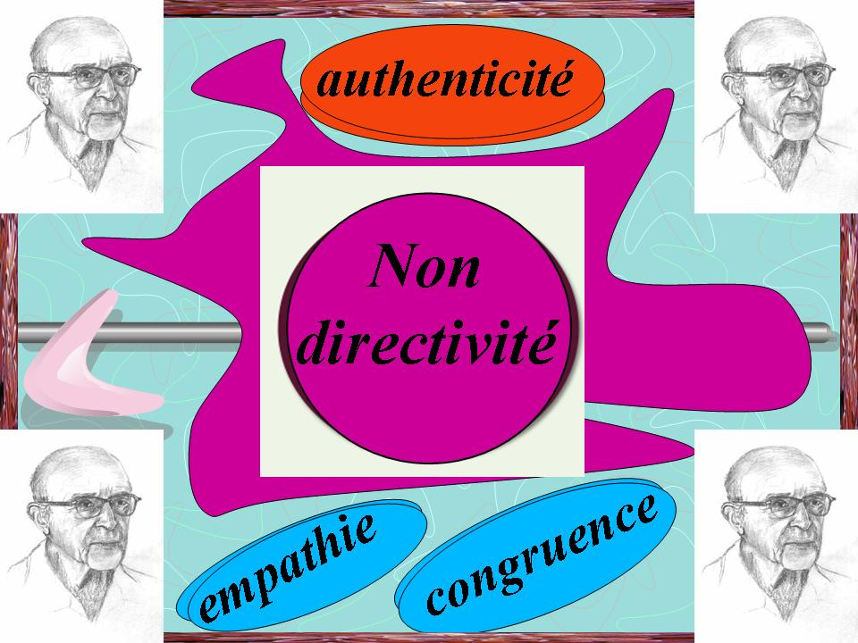 Entretien d'aide et non directivité